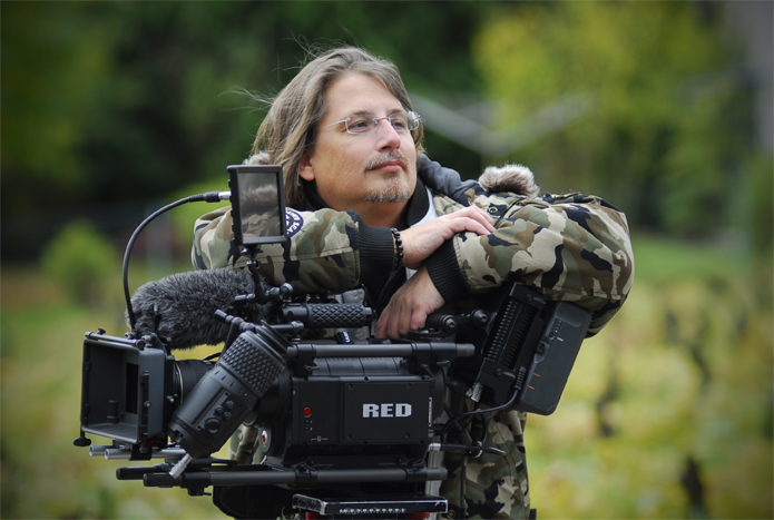 Alexander Detig Portrait